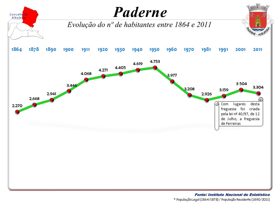 Censos 1864/2011